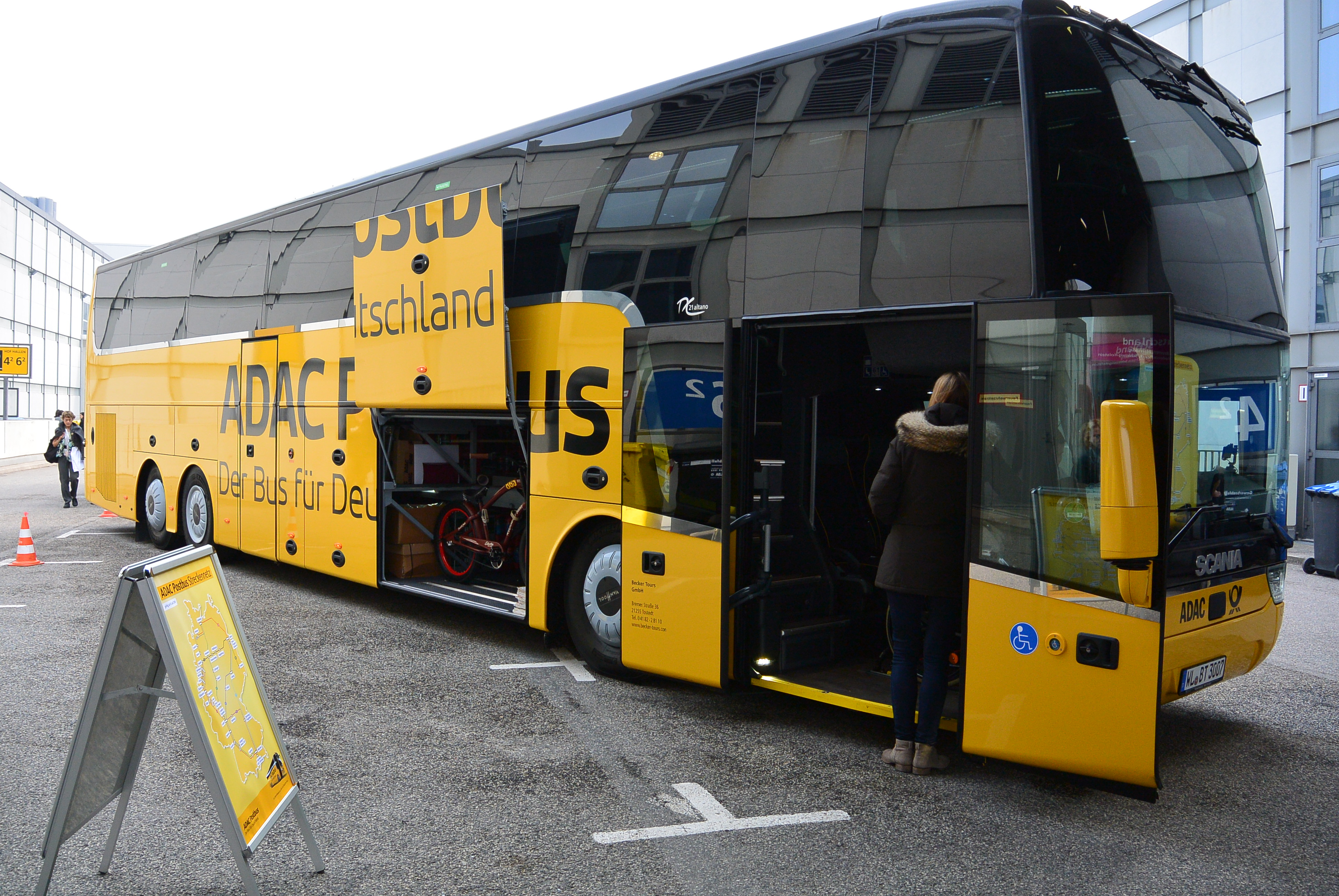 Autokar VanHool TD921 Altano przewoźnika ADAC Postbus podczas ITB Berlin 2014.